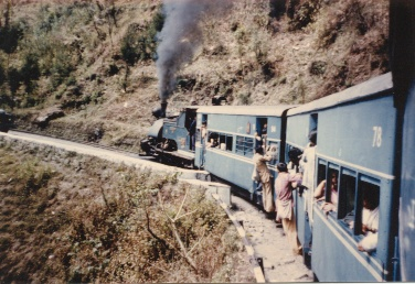 Die Darjeelingbahn unterwegs.